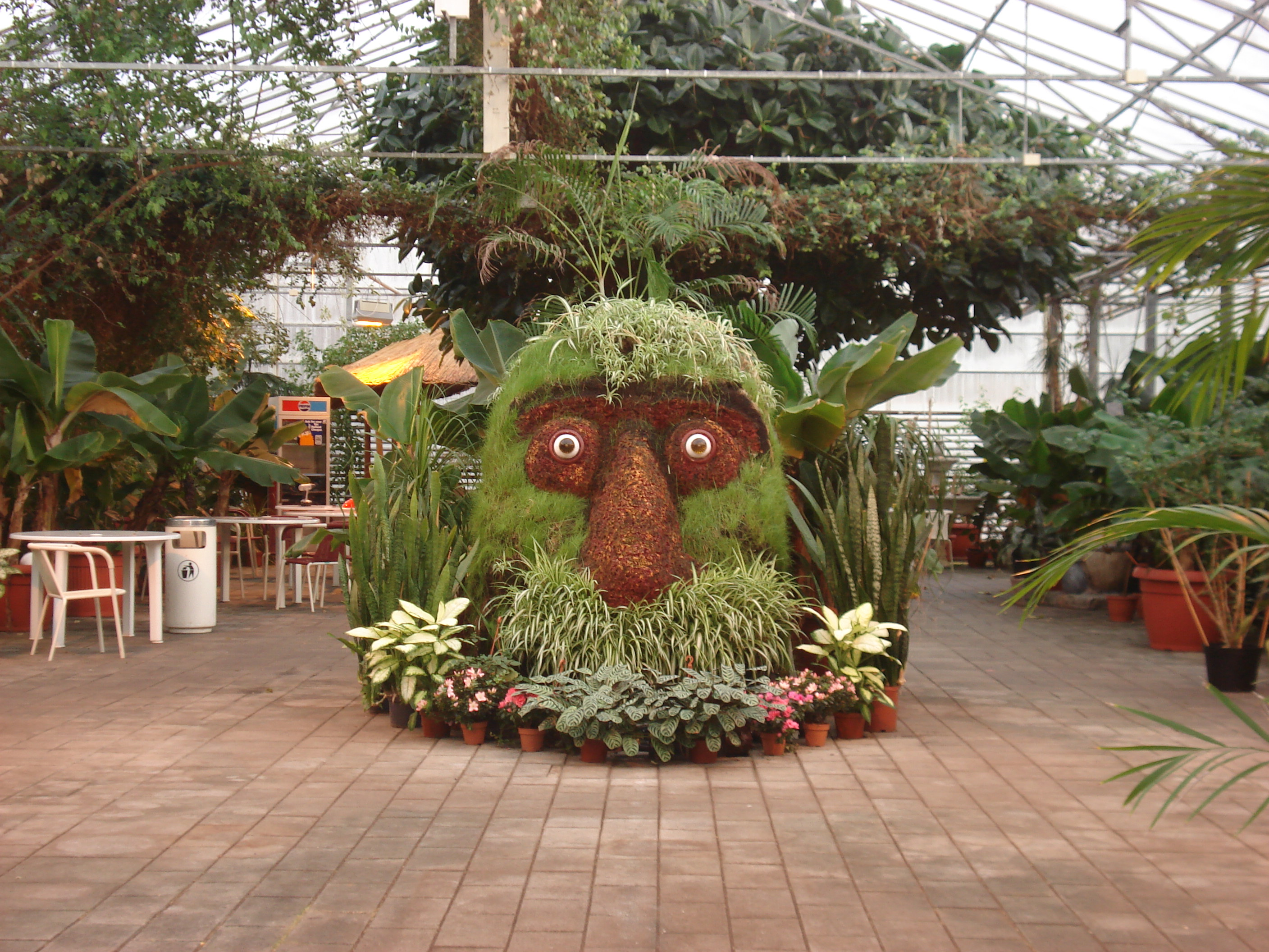 A fake face in Eden greenhouse, Hveragerdi, Iceland.